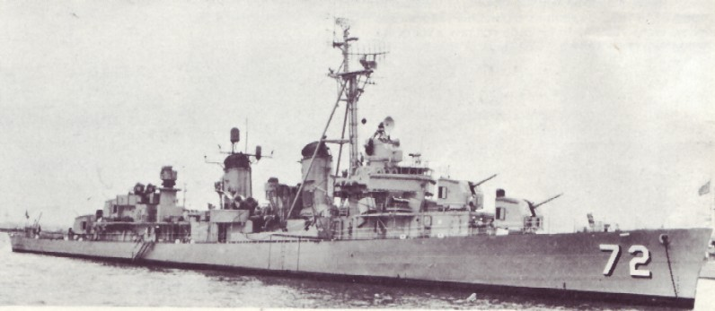 Destructor peruano BAP Almirante Guise DD-72 alrededor de 1964